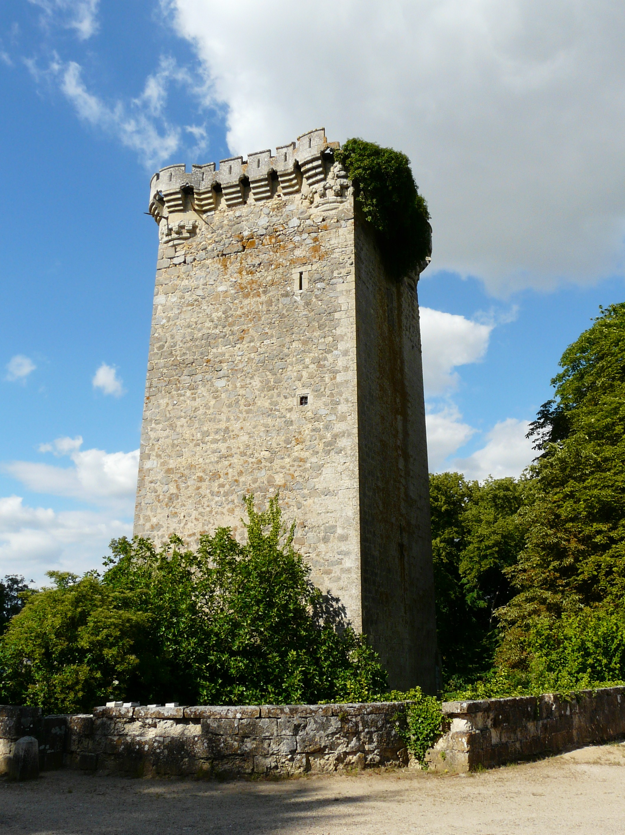 Le donjon du vieux château, château de Saint-Loup-sur-Thouet, Saint-Loup-Lamairé, Deux-Sèvres, France